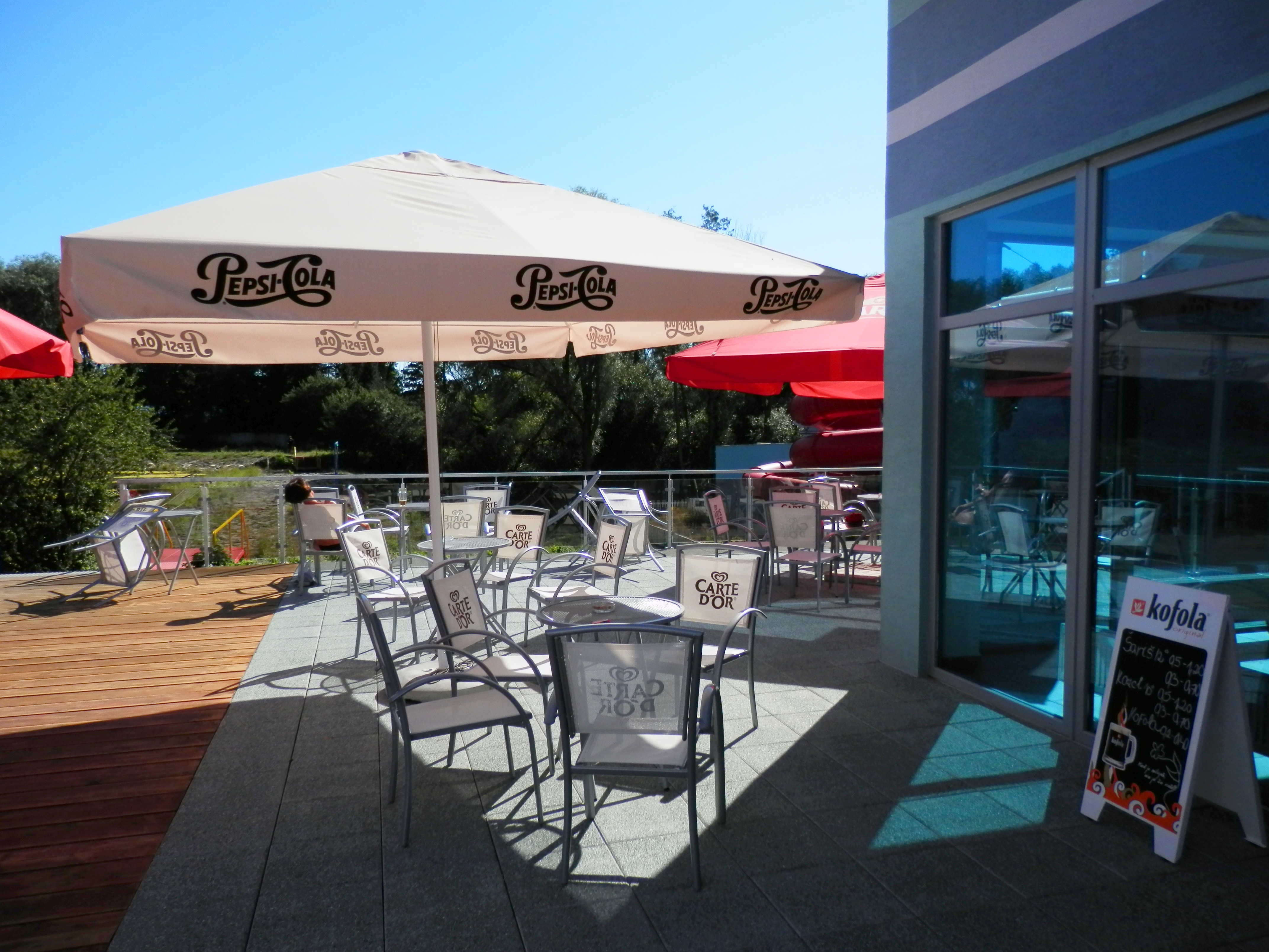 Aquapark Delňa v meste Prešov